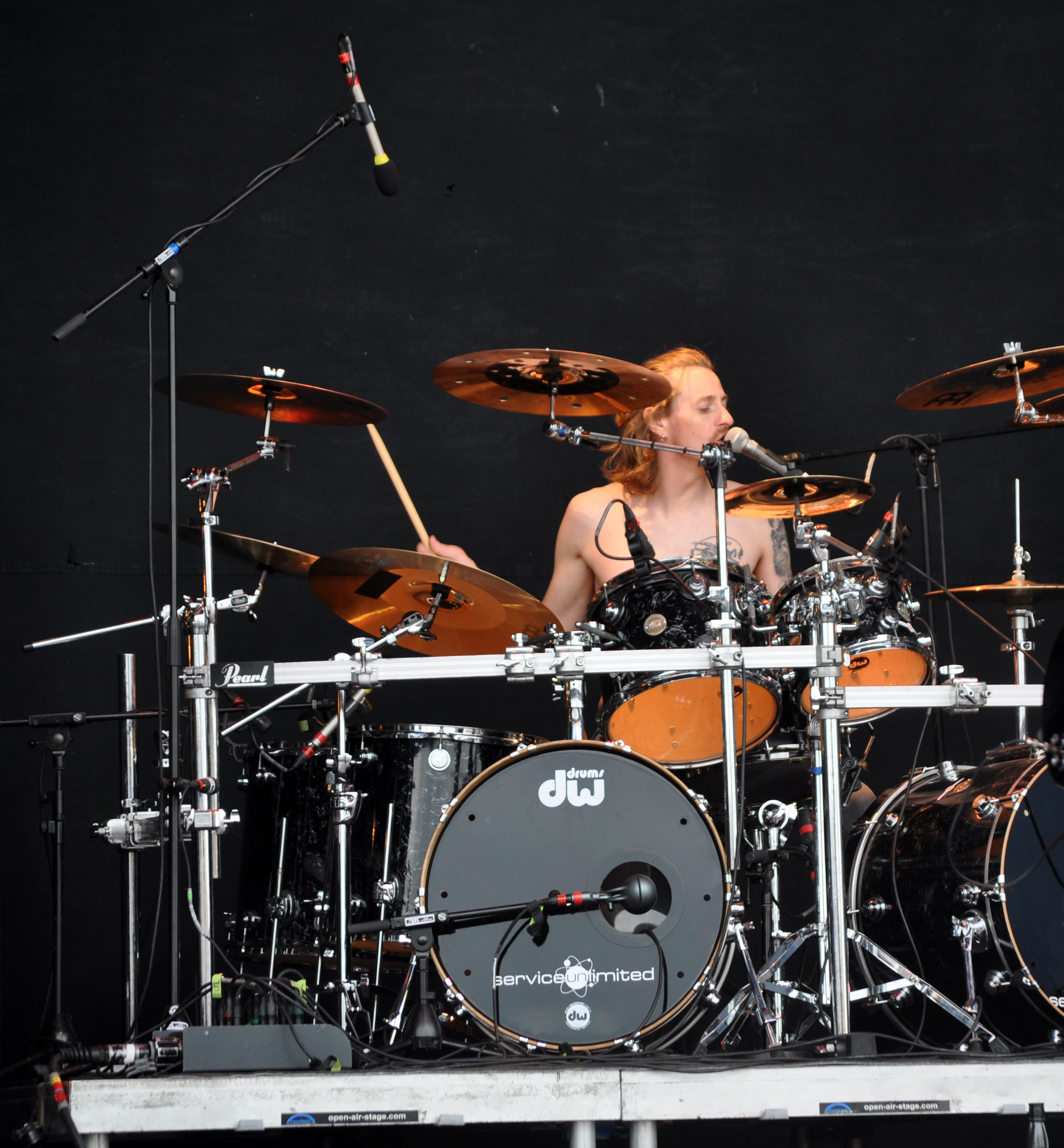 Skálmöld at Party.San Open Air 2012